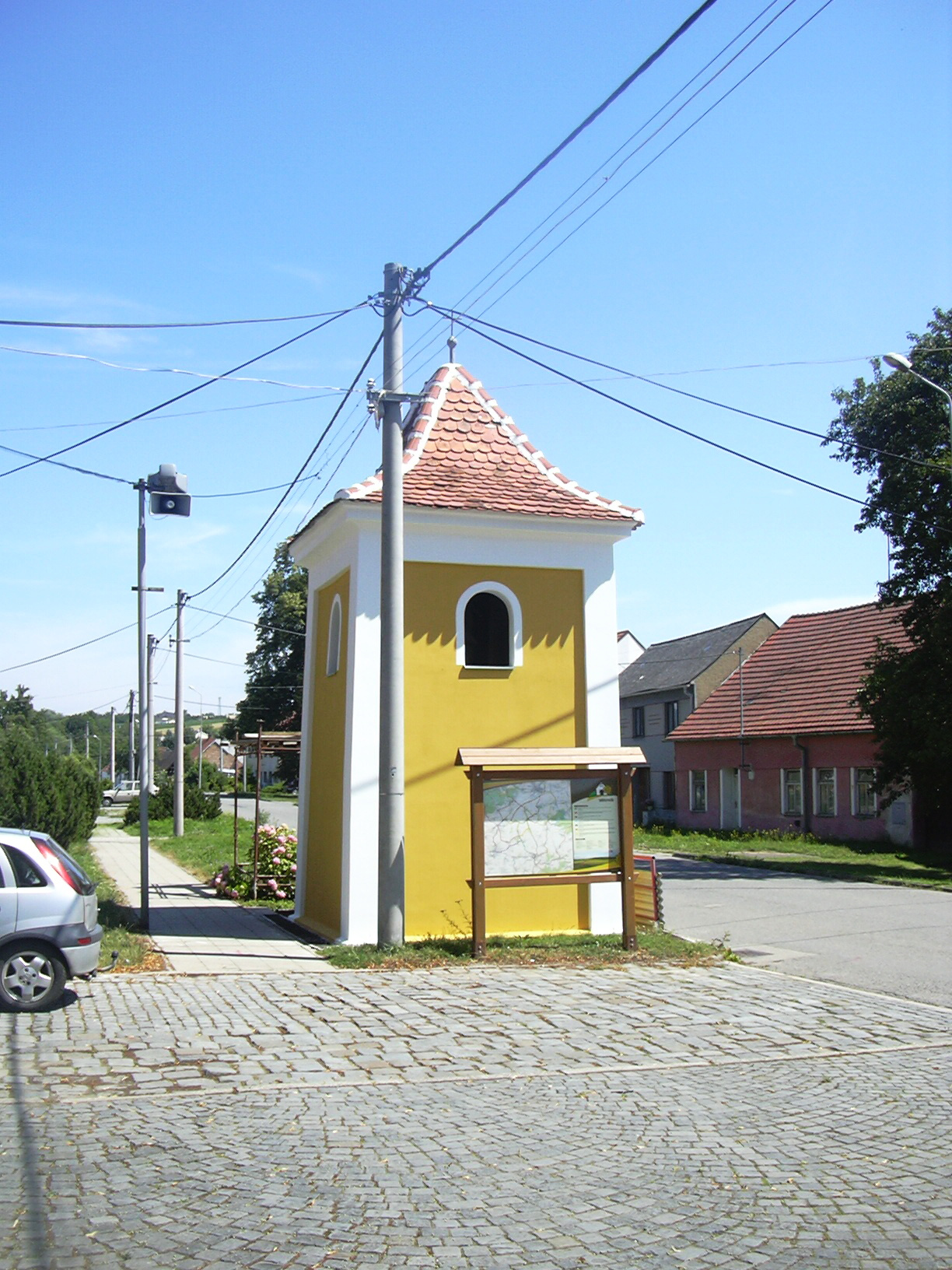 Zvonice Tučapy (Vyškov- Czech republic)